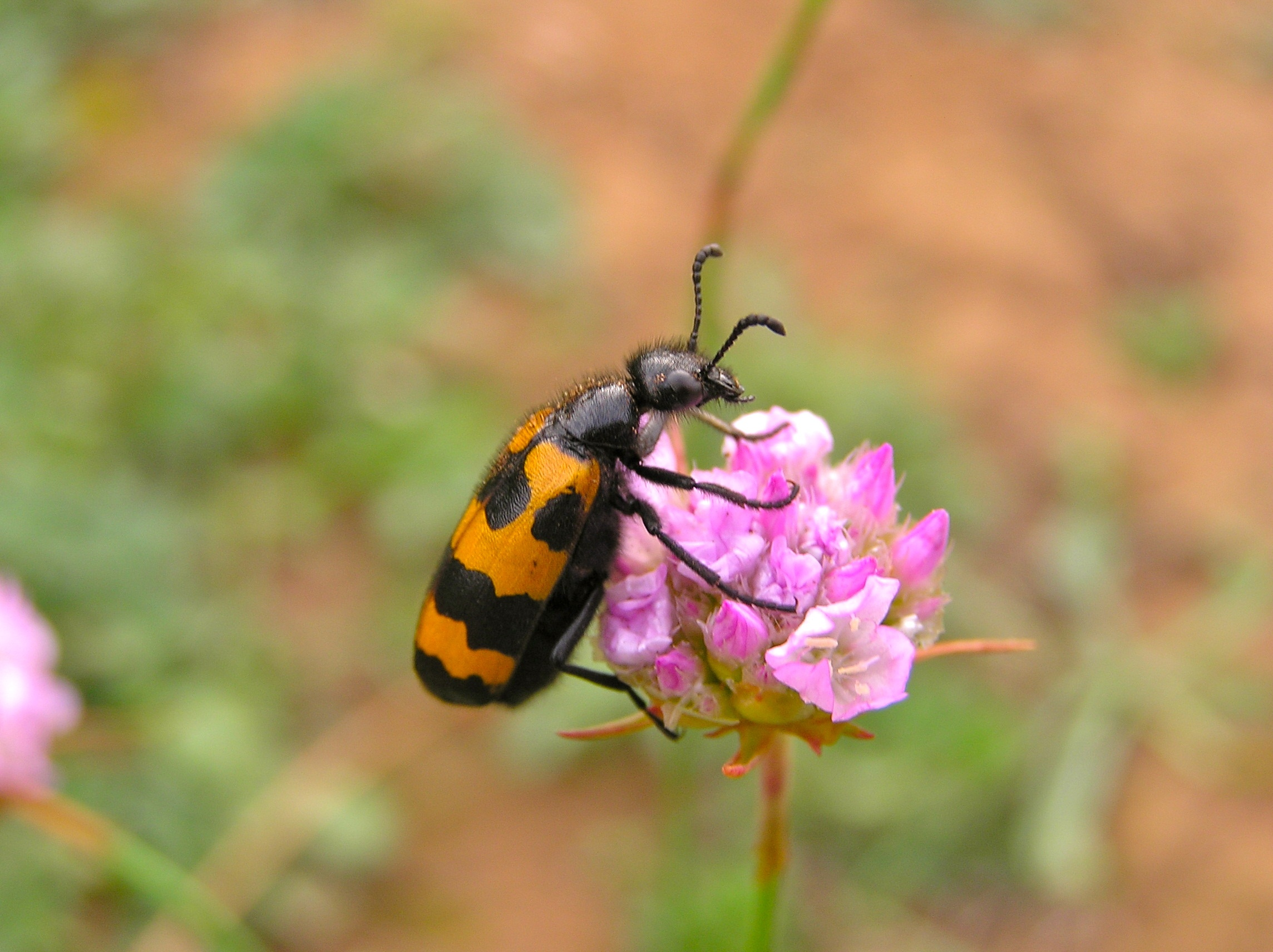 Les Rives, Hérault, FRANCE